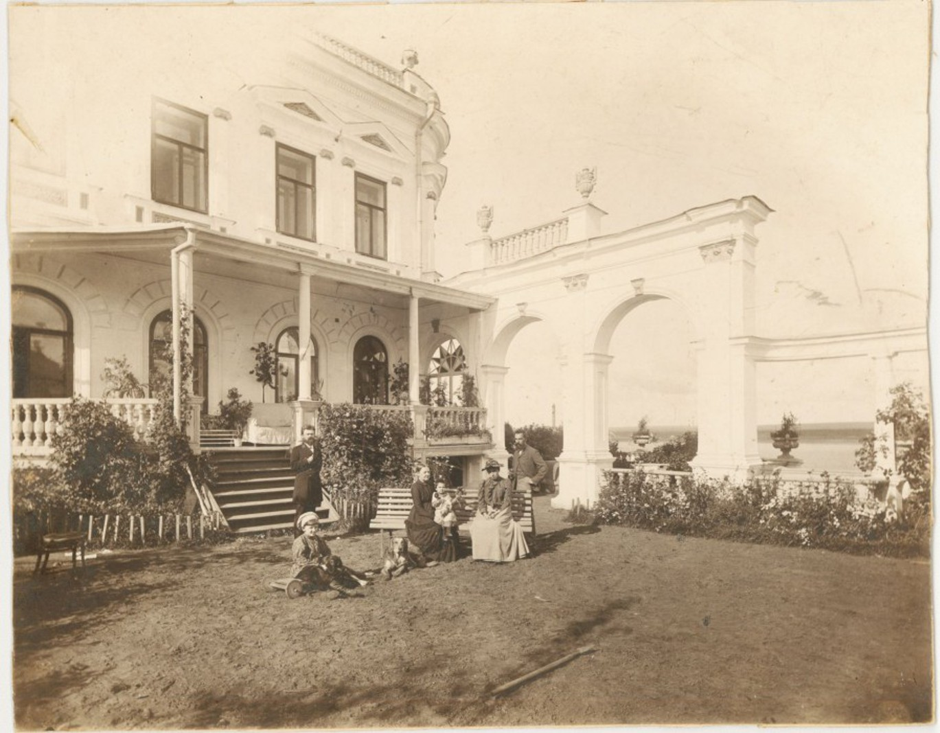 Н.В. Мешков во дворе дома. 1893